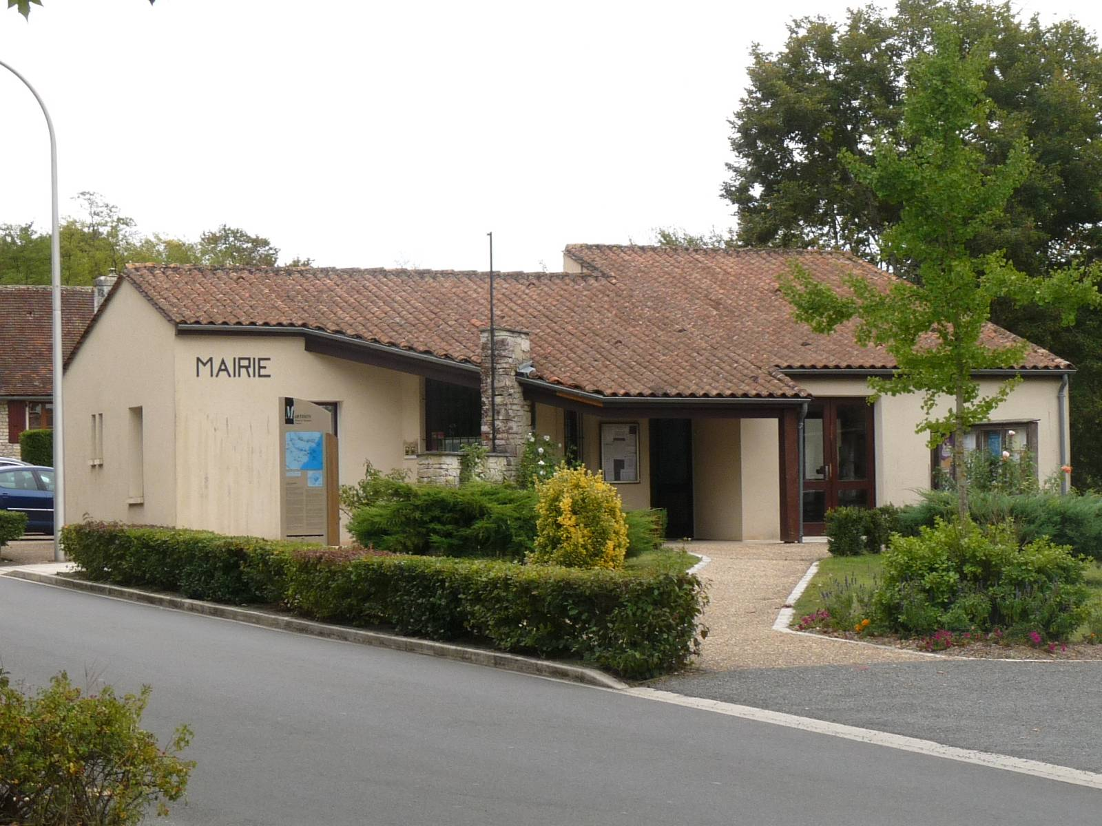 mairie de Marthon, Charente, France